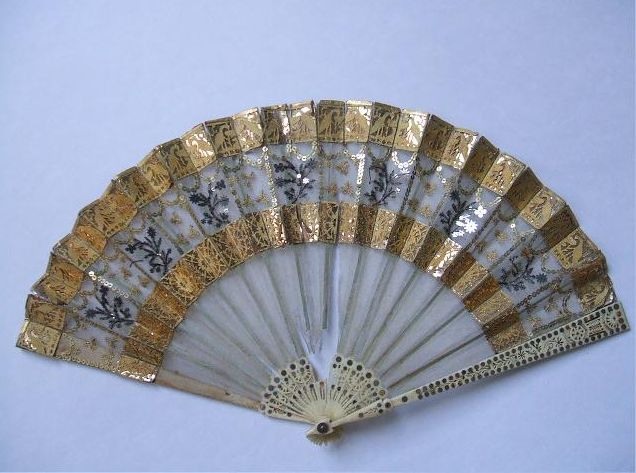 Hand fan 1800 - 1805